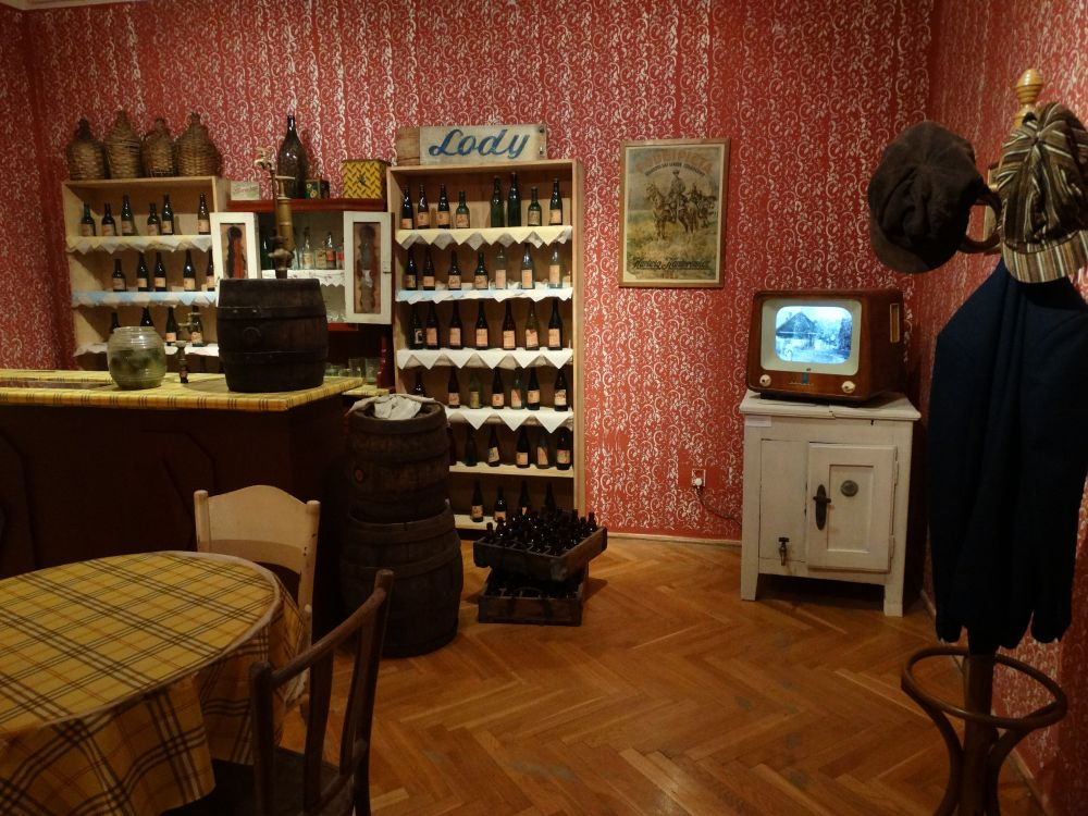 Fragment wystawy czasowej "Andrusy, kindry, agary..." w Domu Zwierzynieckim, oddziale Muzeum Historycznego Miasta Krakowa